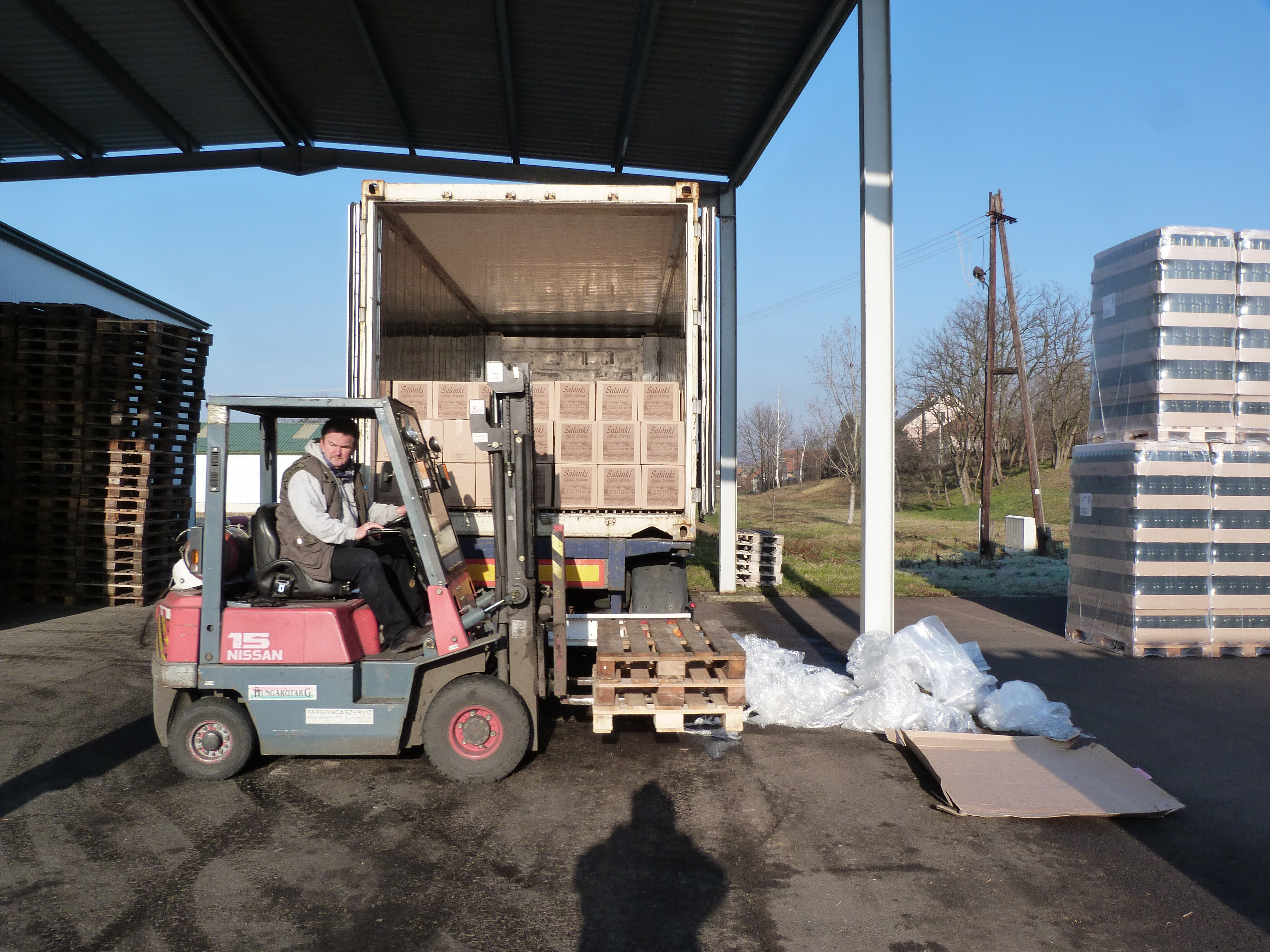 A felvétel 2015. január 14-én szerdán készült Novajon. Palackozott bort rakodó targonca. ©© Derzsi Elekes Andor, Budapest, 2015 Published in the Metapolisz DVD line. You are authorised to use this vid under Creative Commons – even for commercial, for profit purposes. The vid must be attributed to Derzsi Elekes Andor. All of the photos and vids in the Metapolisz DVD line are under Creative Commons and can be used even for commercial – for profit – purposes. Recommended Citation Derzsi Elekes Andor: Metapolisz DVD line